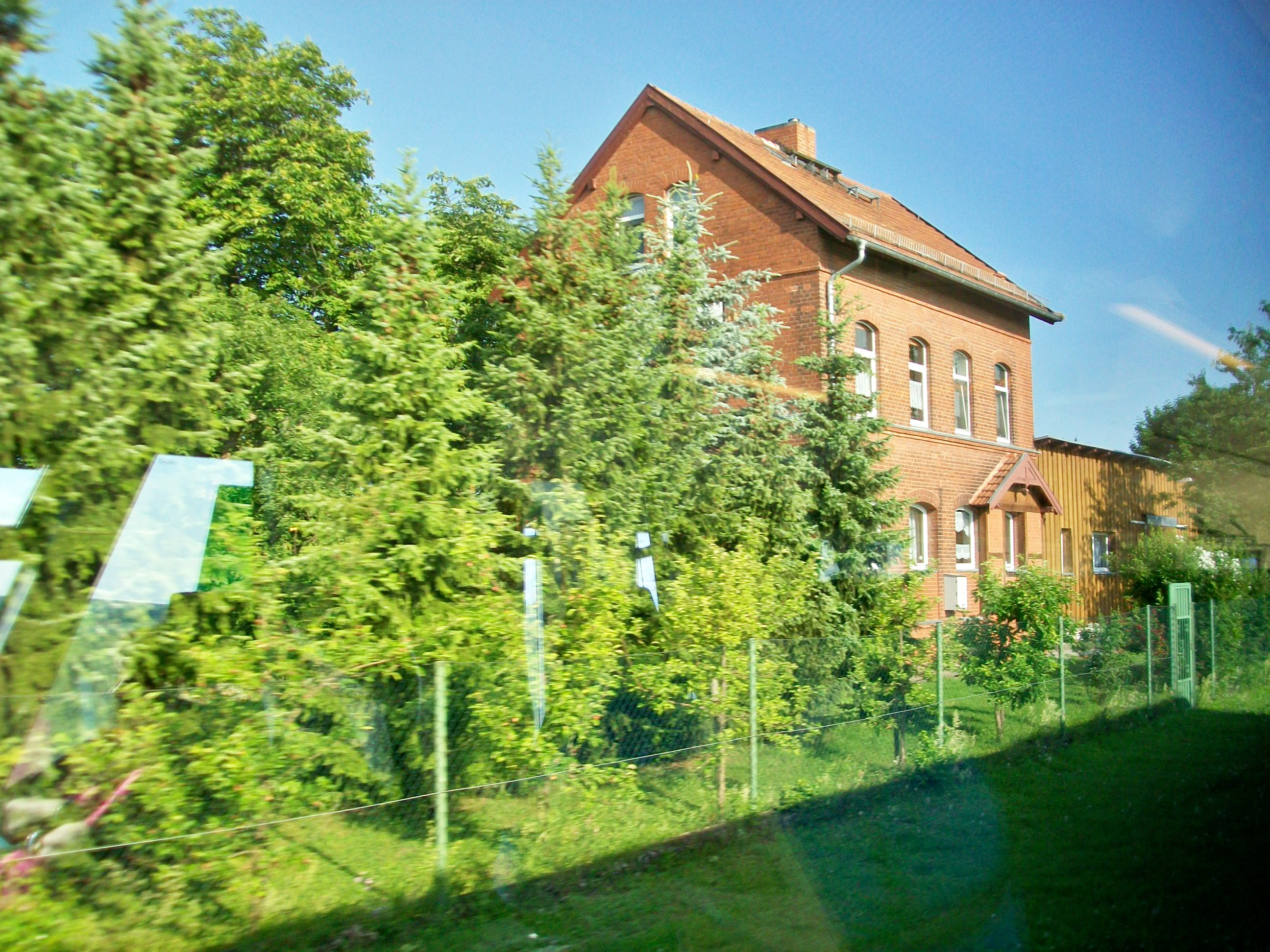 Ehemaliger Bahnhof von Witterda (bei Elxleben, Thüringen/Deutschland)